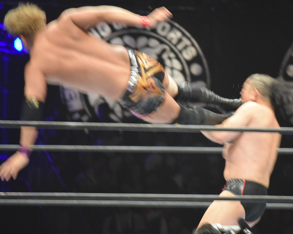 2017年2月11日 大阪府立体育会館 「THE NEW BEGINNING in OSAKA」 鈴木みのるにドロップキックを放つオカダ・カズチカ